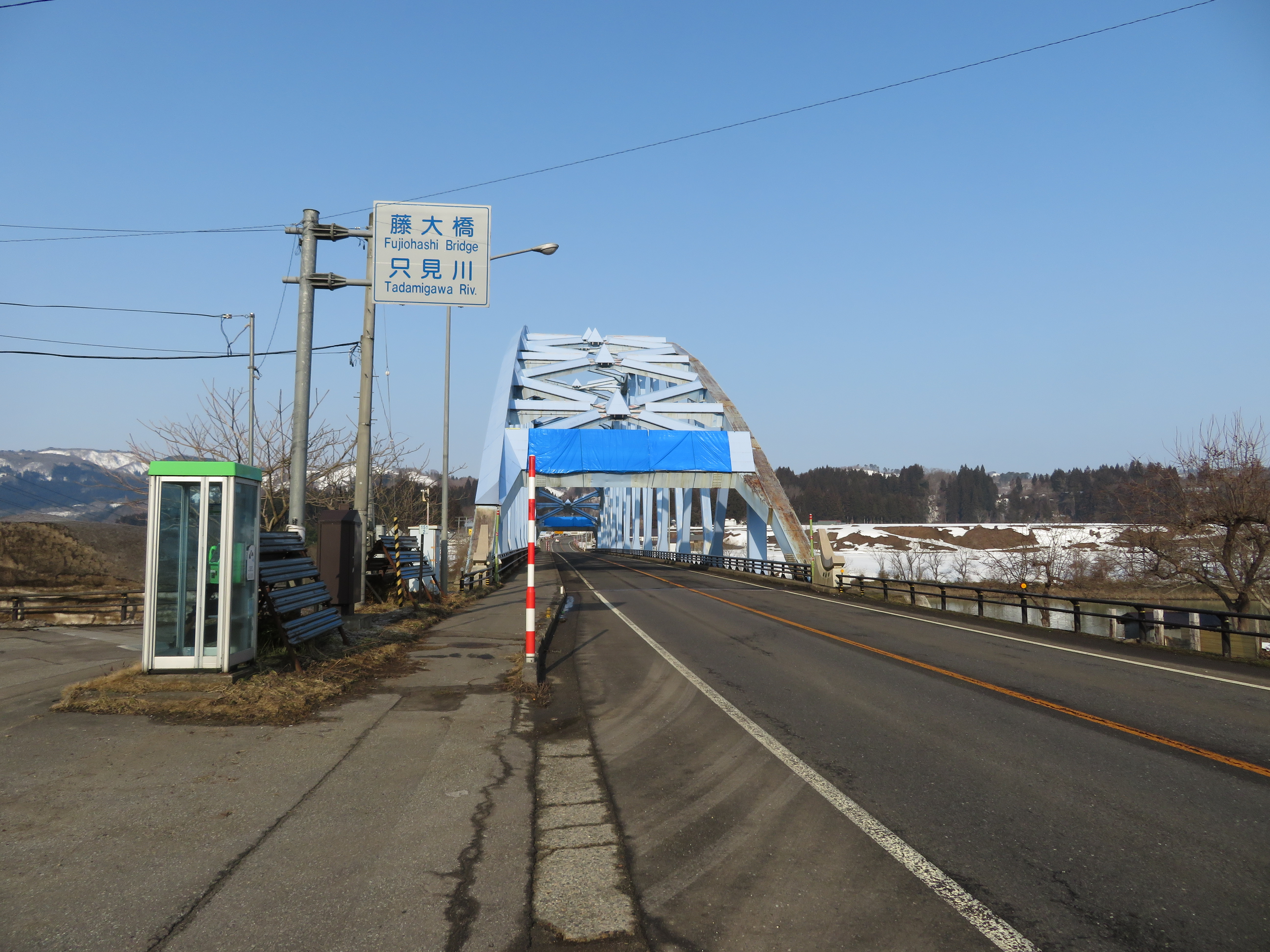 国道49号線藤大橋付近（会津若松方面側から撮影）